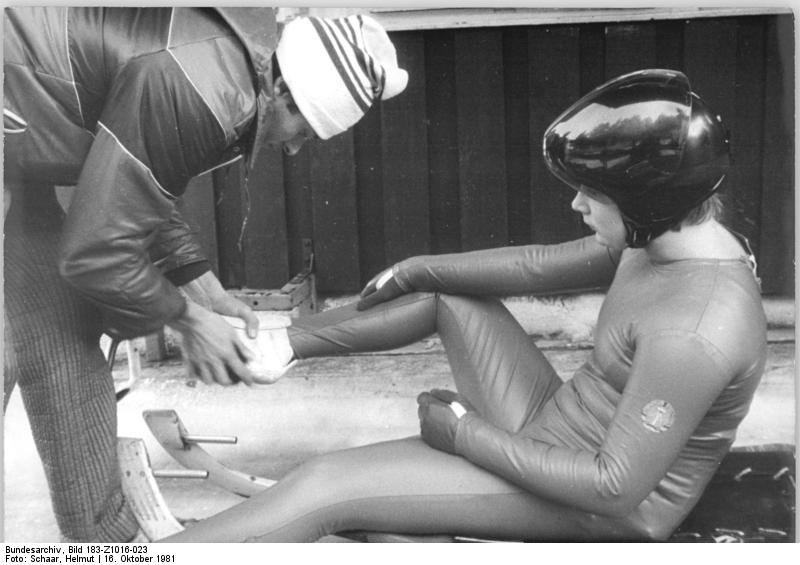 Heike Popel ADN-ZB Schaar zi-16.10.1981-Oberhof: Start in die neue Saison-Mit einem Handicap-Rennen starteten die DDR-Rennschlittensportler in eine ereignisreiche Saison. Heike Popel (SC Traktor Oberwiesenthal) bereitet sich auf ihren Start vor und führt nach dem ersten Lauf.